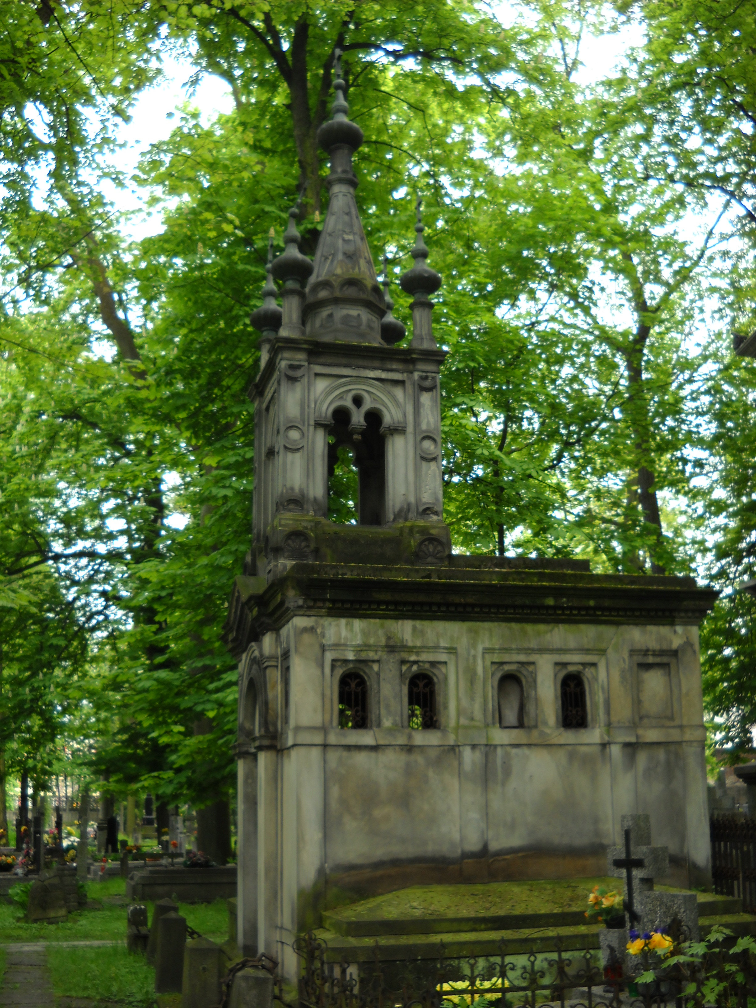 Grób Istominów na cmentarzu prawosławnym na Woli